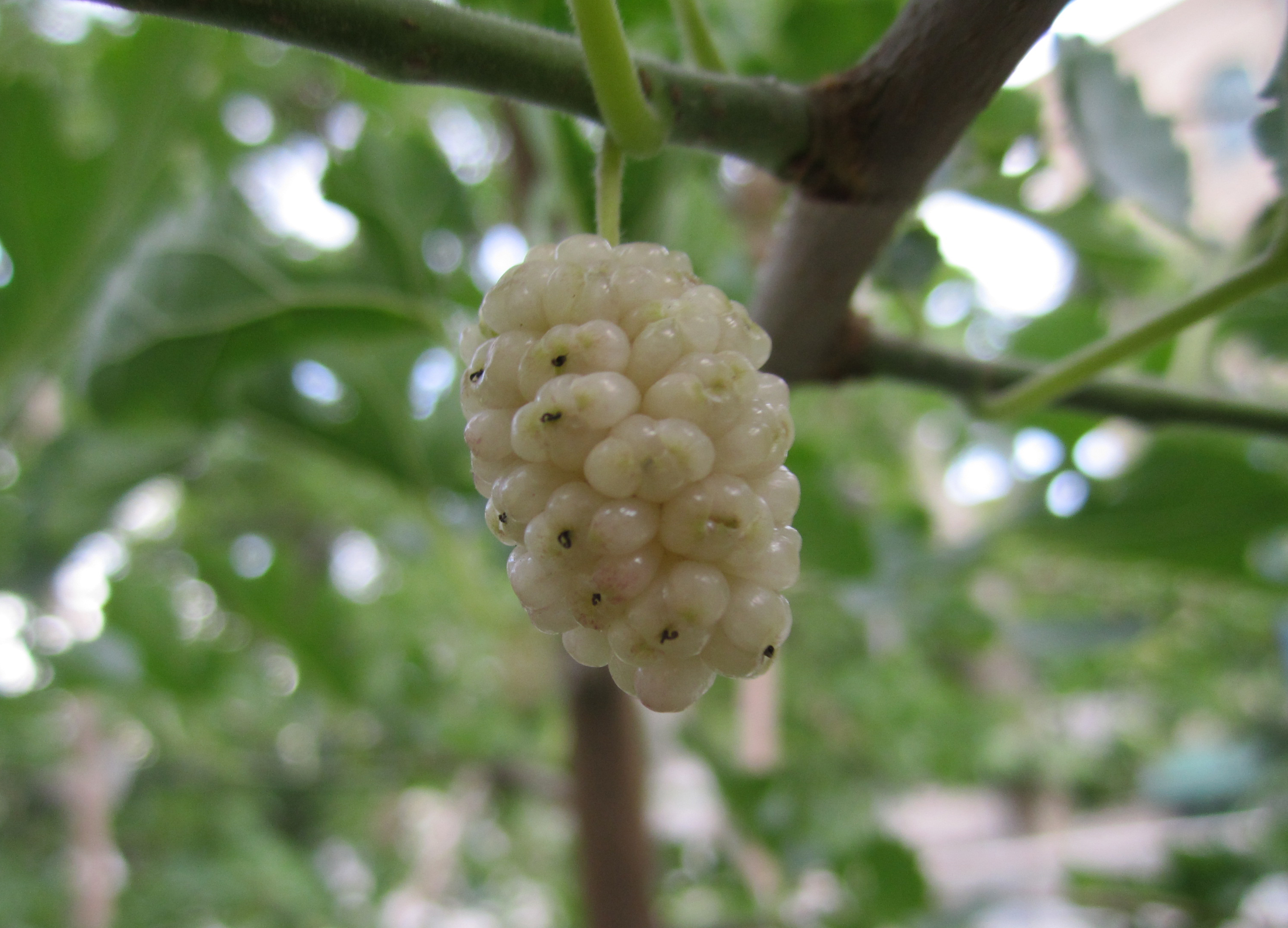 توت سفید